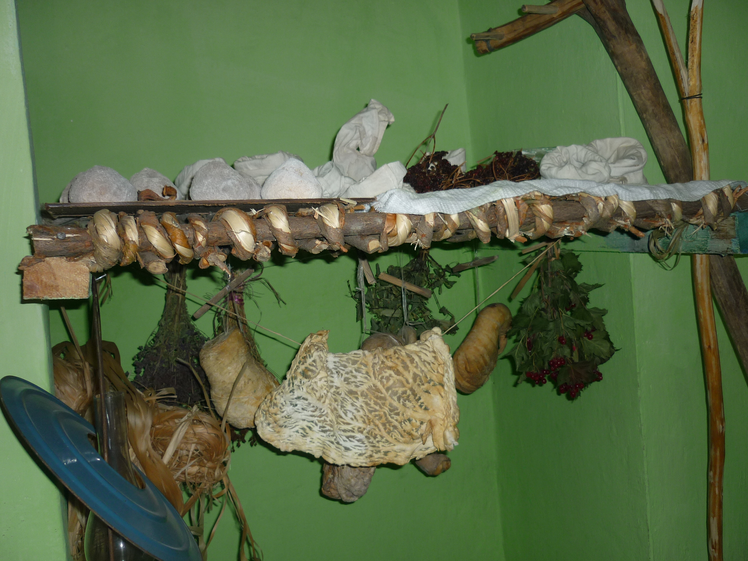 Башҡортса: Ылашта үләндәр һәм ҡорот киптереү